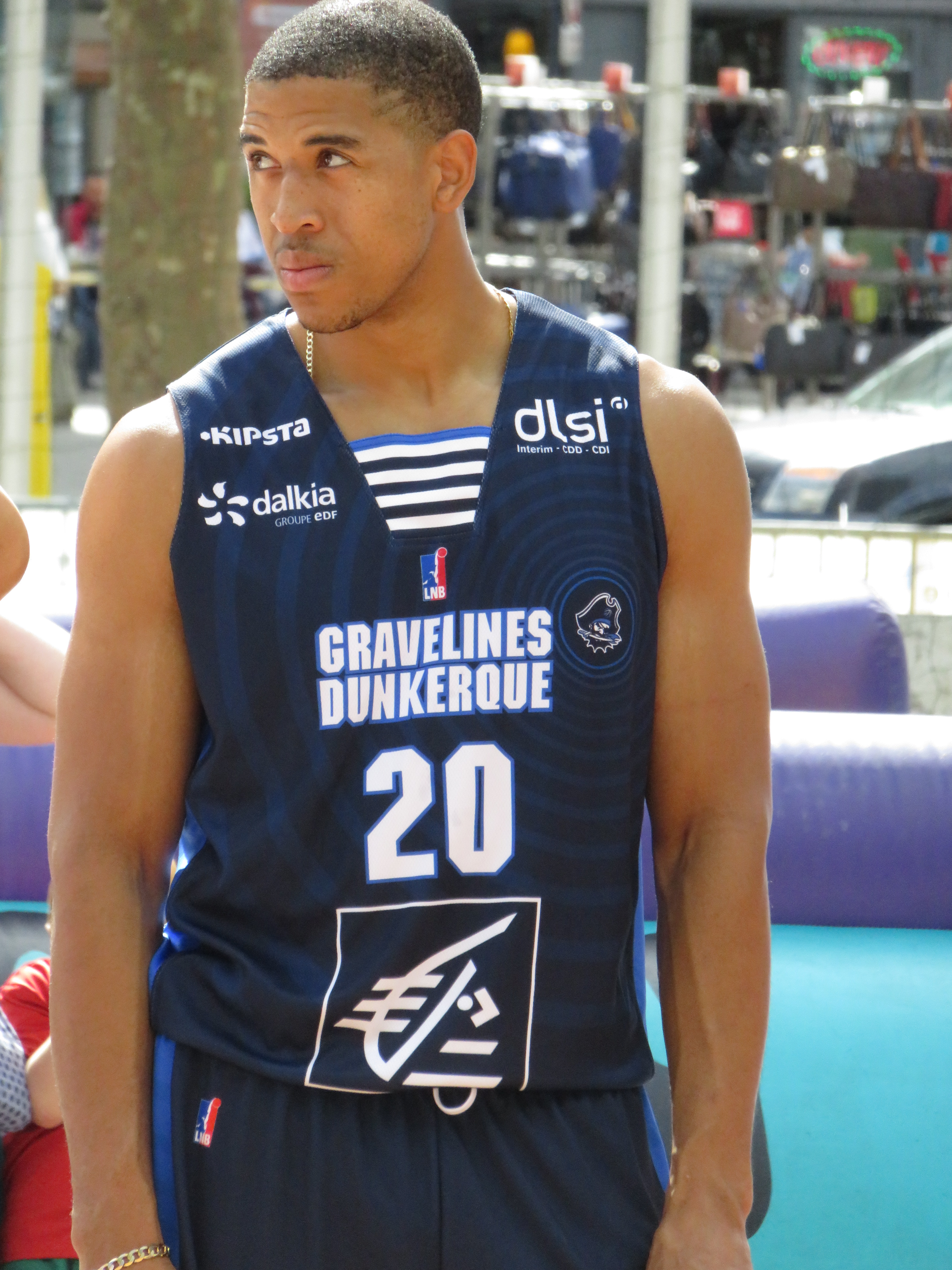 20 Myles Hesson